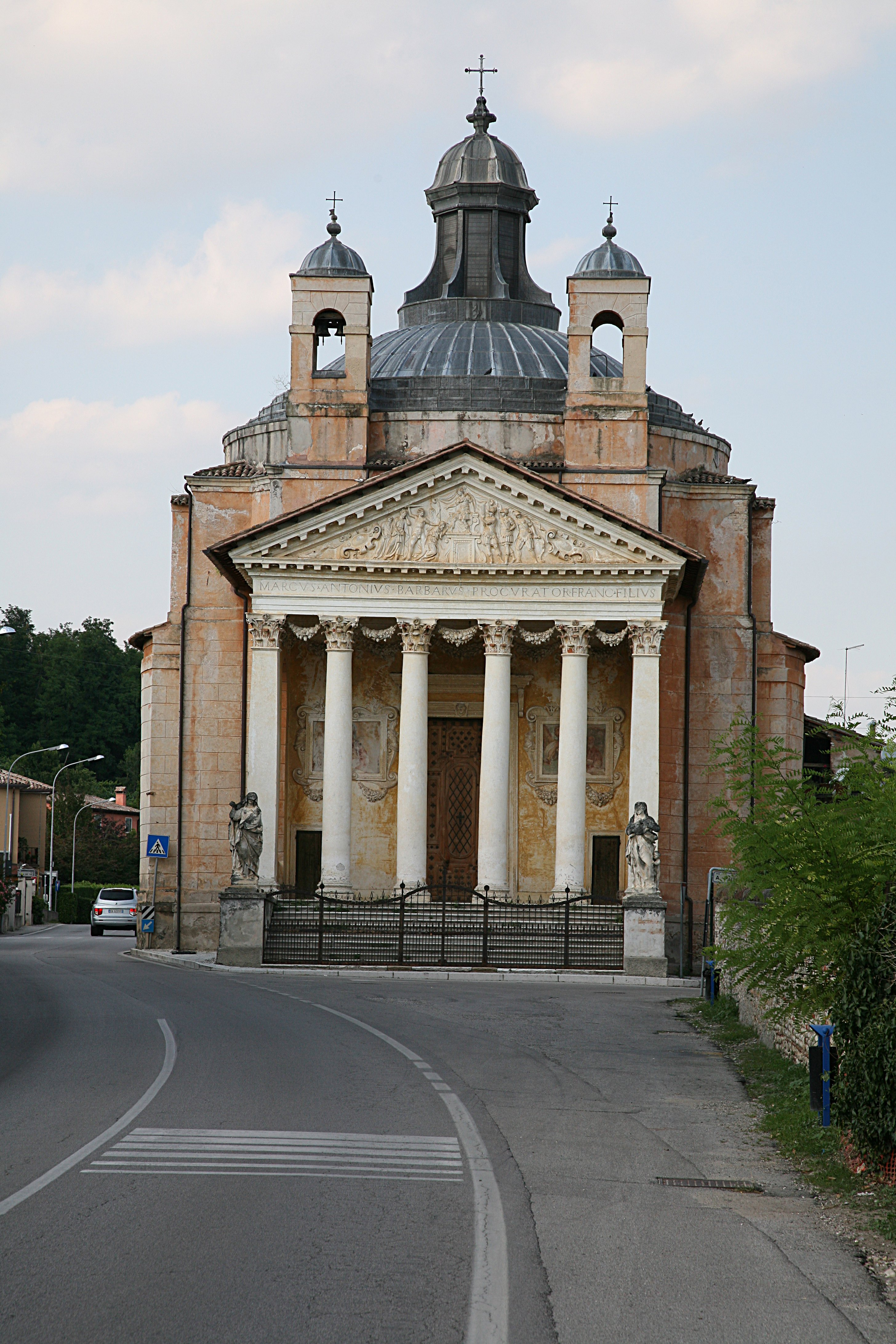 Tempietto di Villa Barbaro by Andrea Palladio